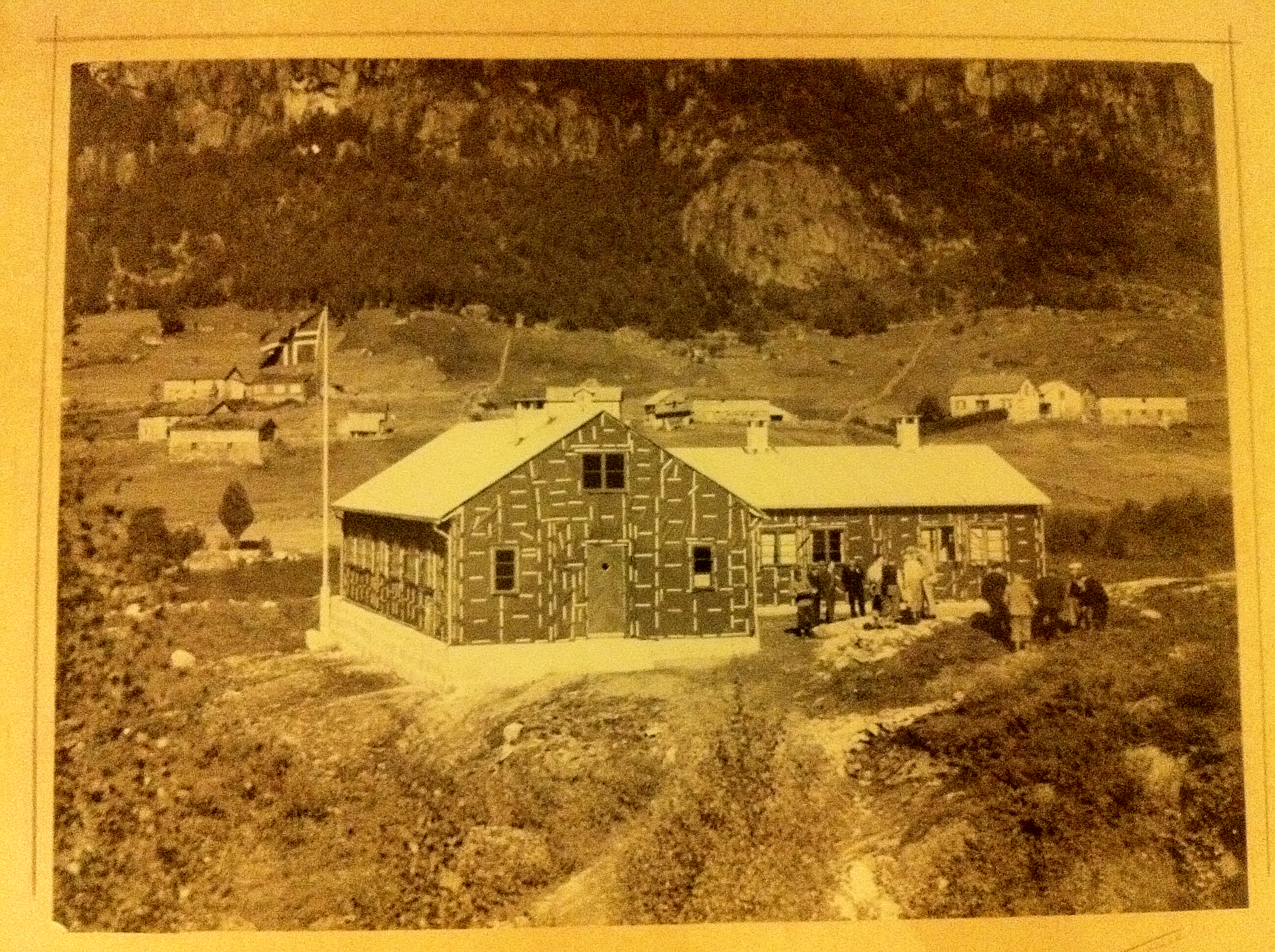 Bilde av Ljosland Fjellstove når den ble oppført i 1937